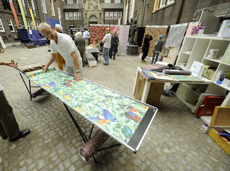 Vorführung 2